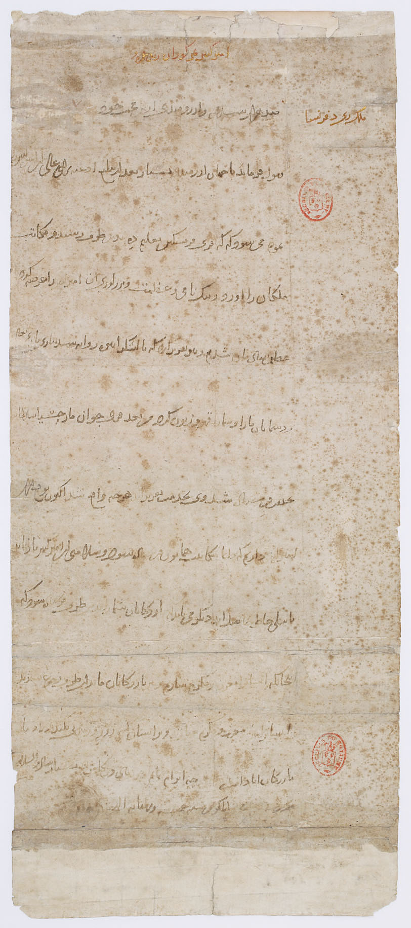 Lettre de Tamerlan à Charles VI, roi de France, pour l'engager à envoyer des marchands en Orient. Original en langue persane.